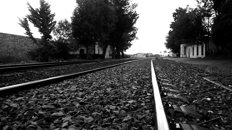 Estación de tren Huamantla